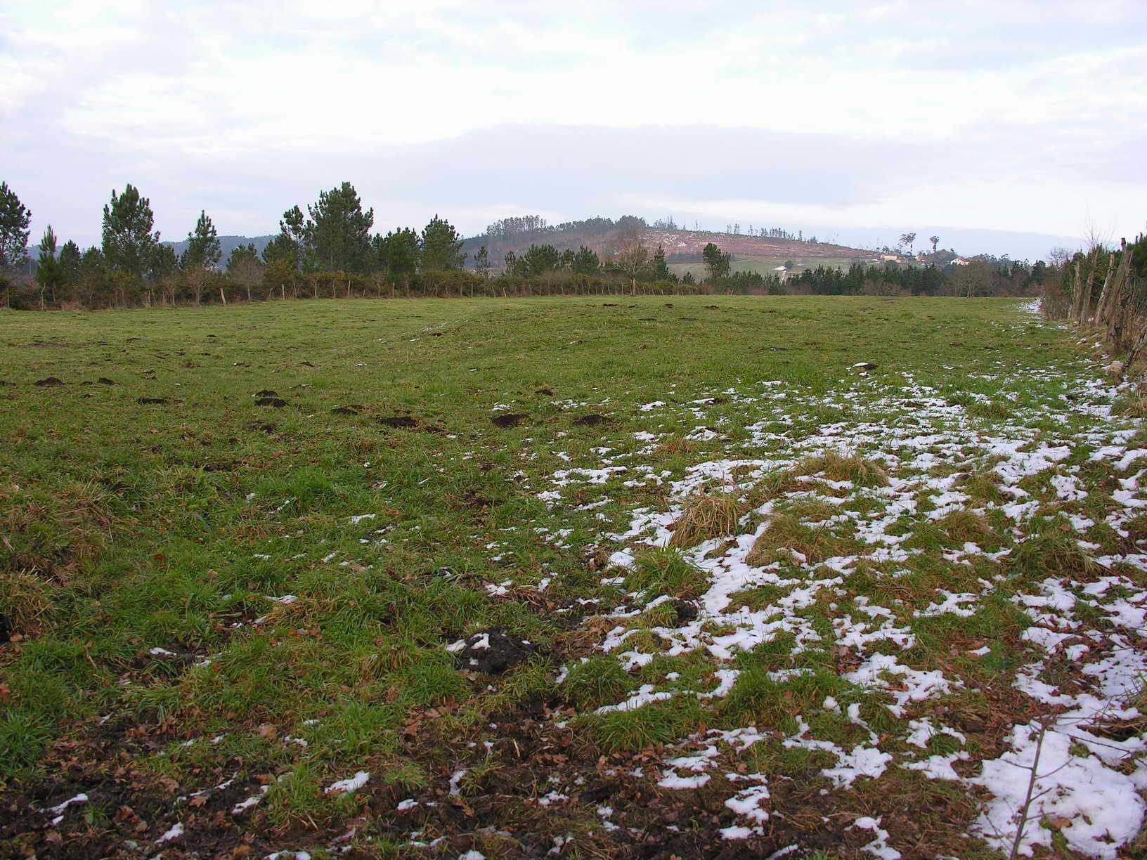 self made. A tres quilómetros de Arzúa